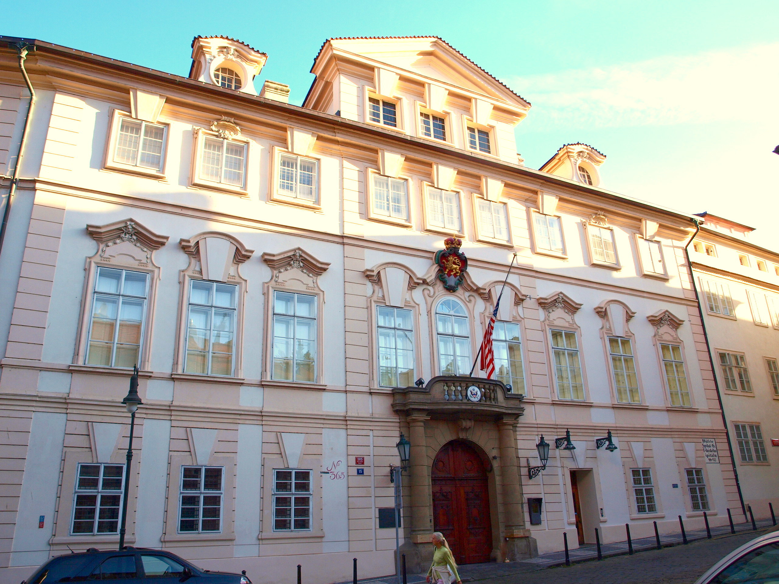 Schönbornský palác v Praze